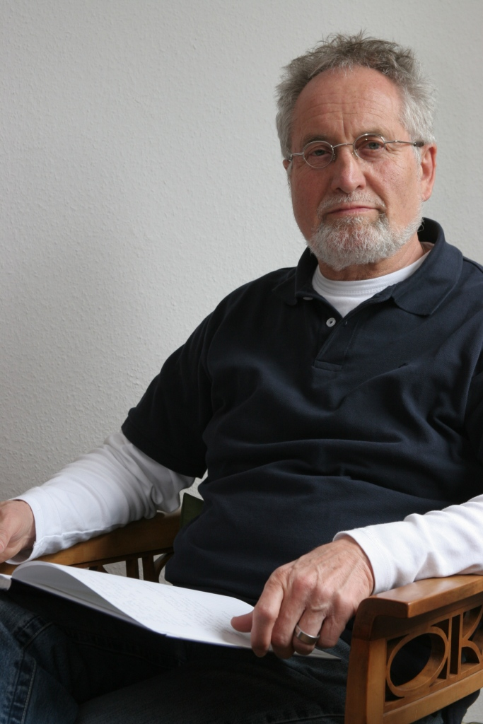 Eberhard Kleinschmidt